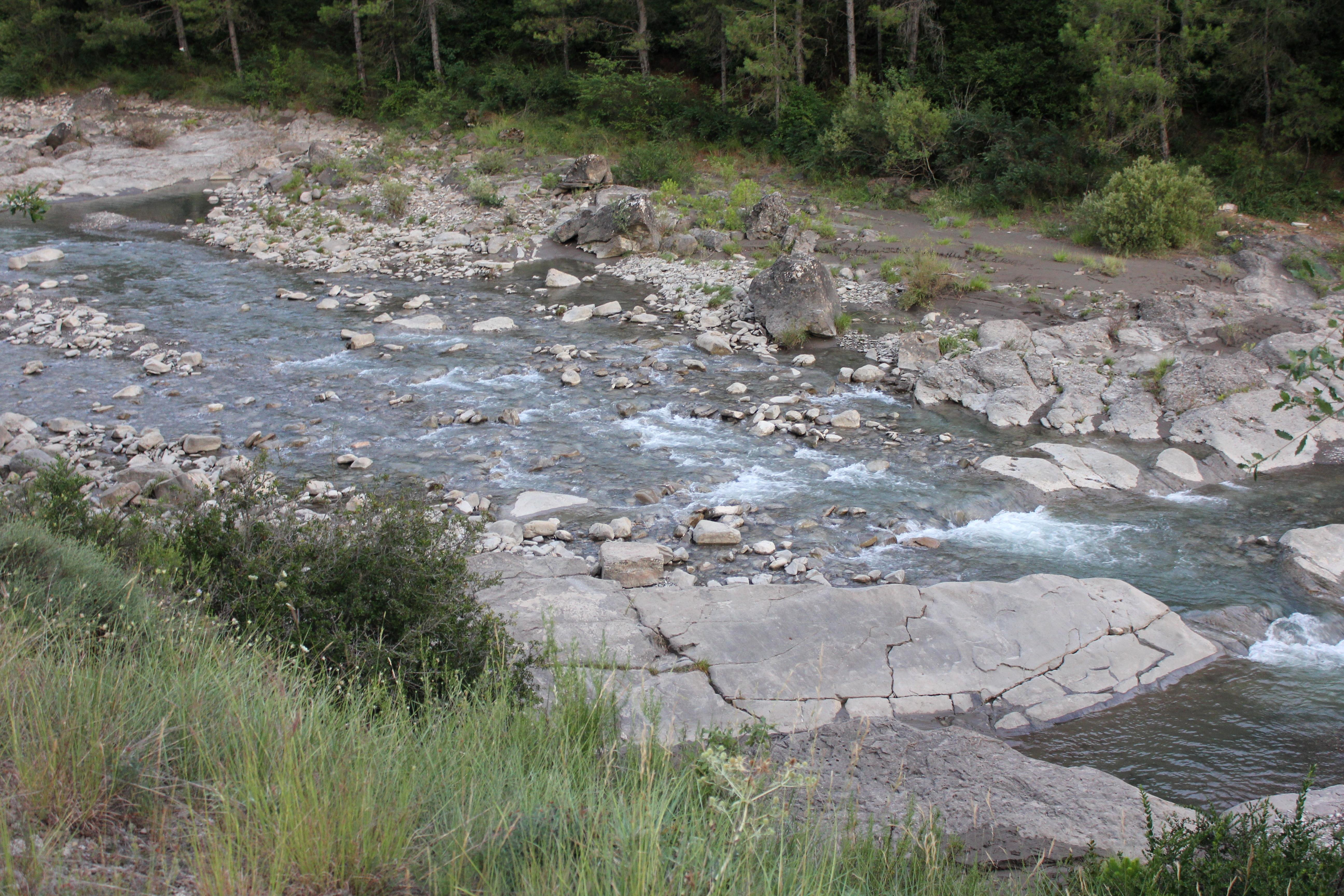 Aragonés: Río d'A Nata